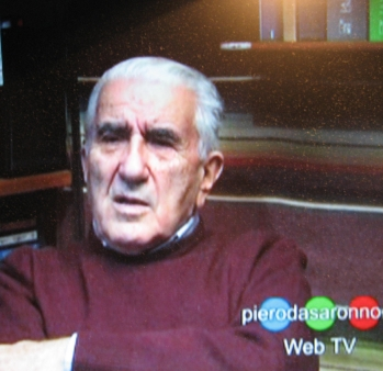 Paride Brunetti. eseguita personalmente dal video WEB PierodiSaronnoWeb.